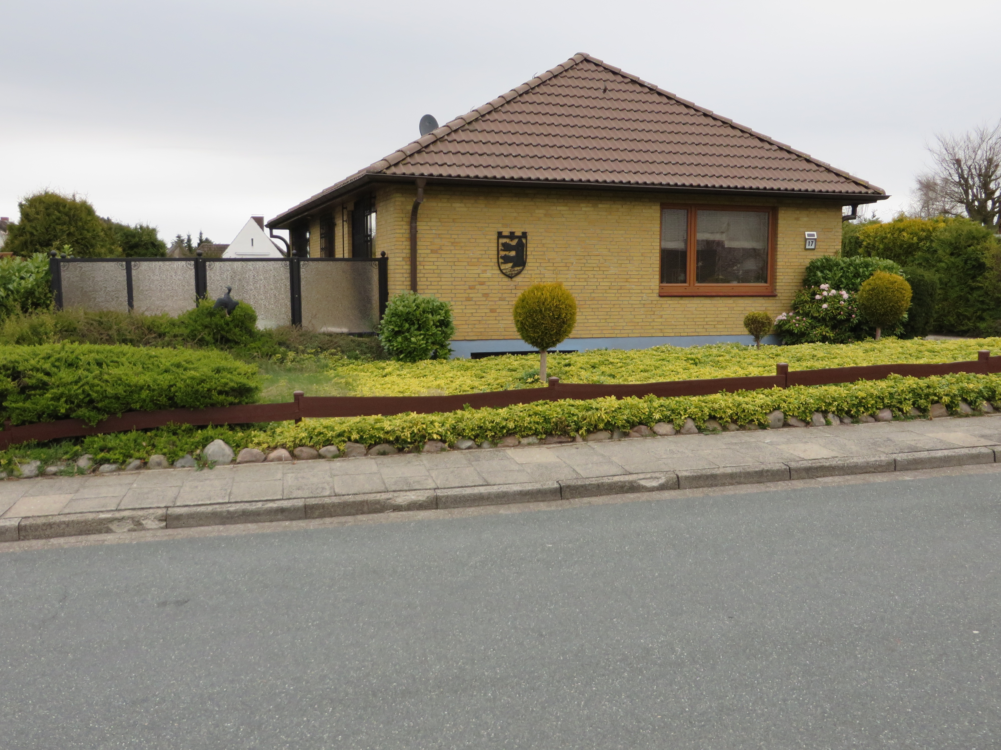 Flensburg-Wappen Stralsunder Straße 17, Flensburg-Mürwik 2014, Bild 05